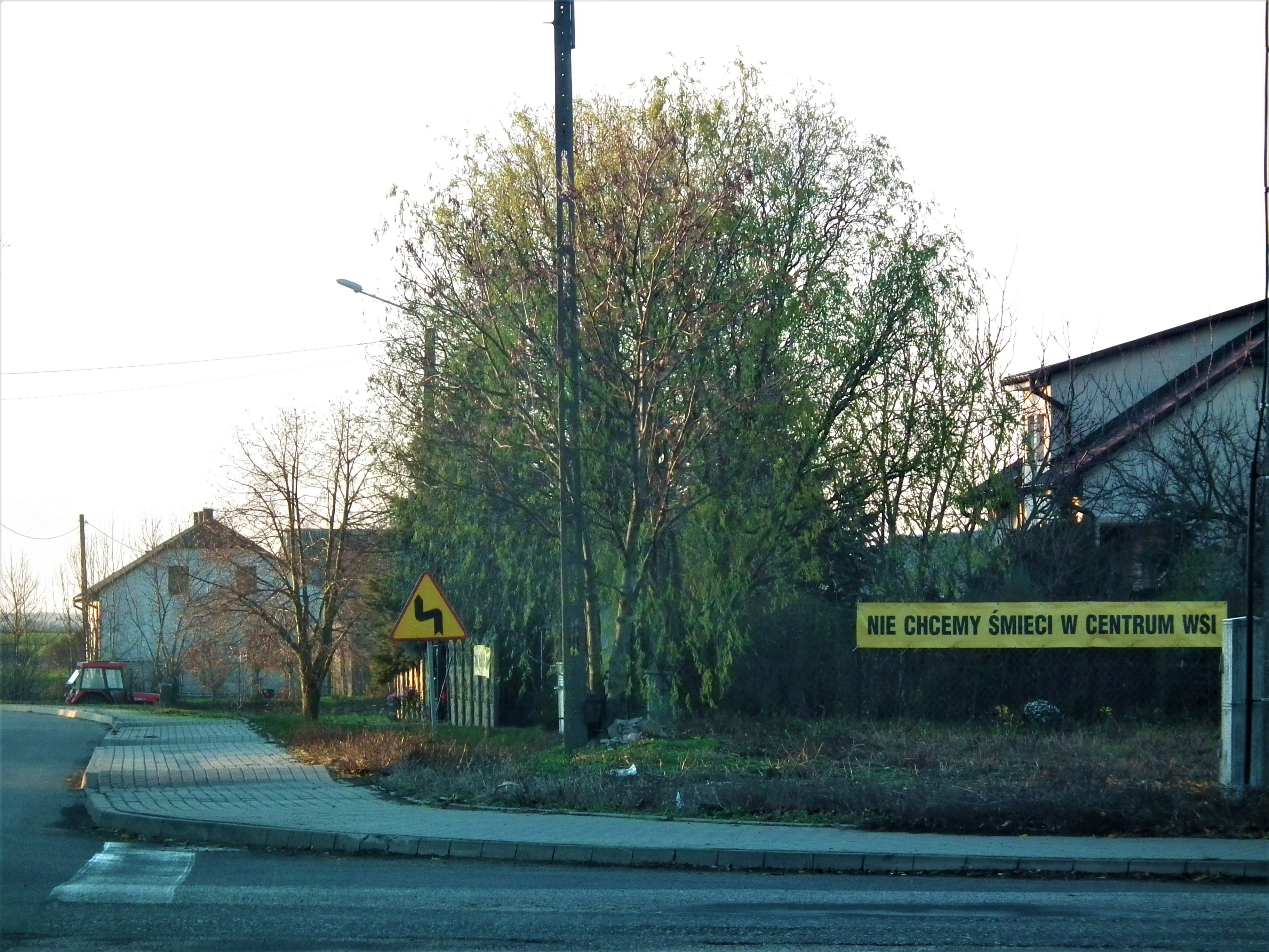 Nowa Wieś (powiat radziejowski).